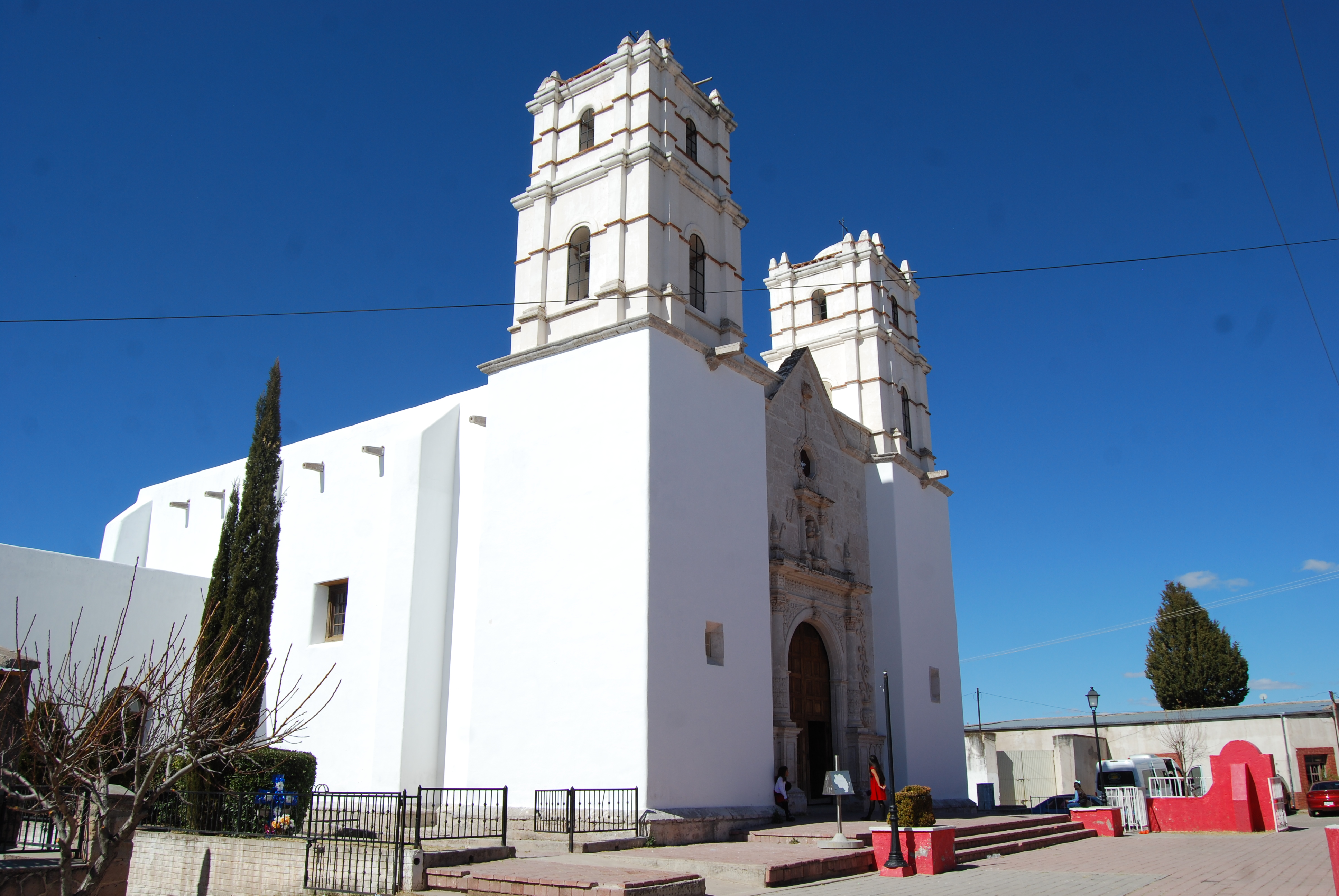 Templo de San Francisco de Borja, edificados durante el siglo XVII.